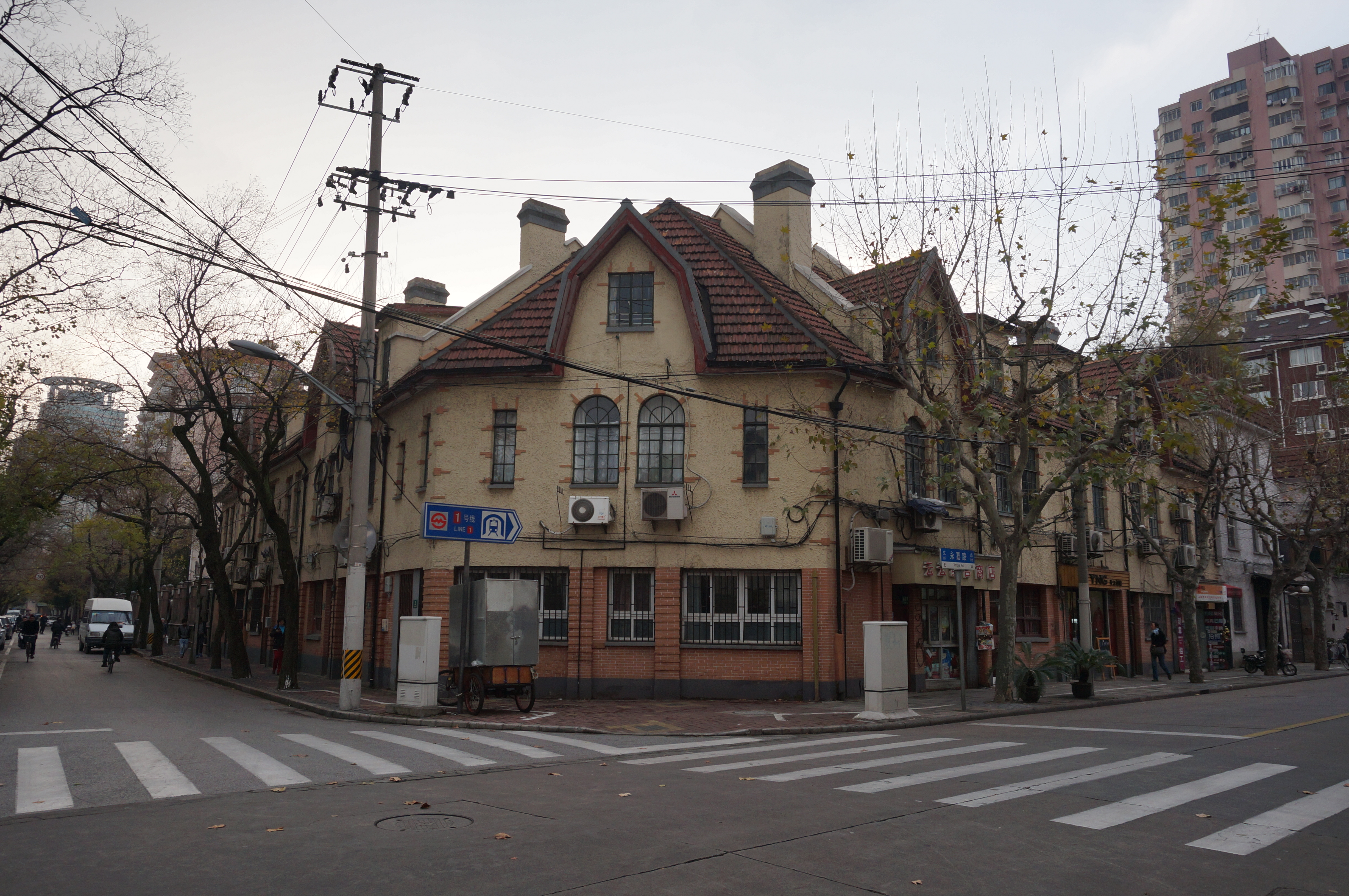 中文（中国大陆）: 永嘉路安亭路路口的一幢历史建筑